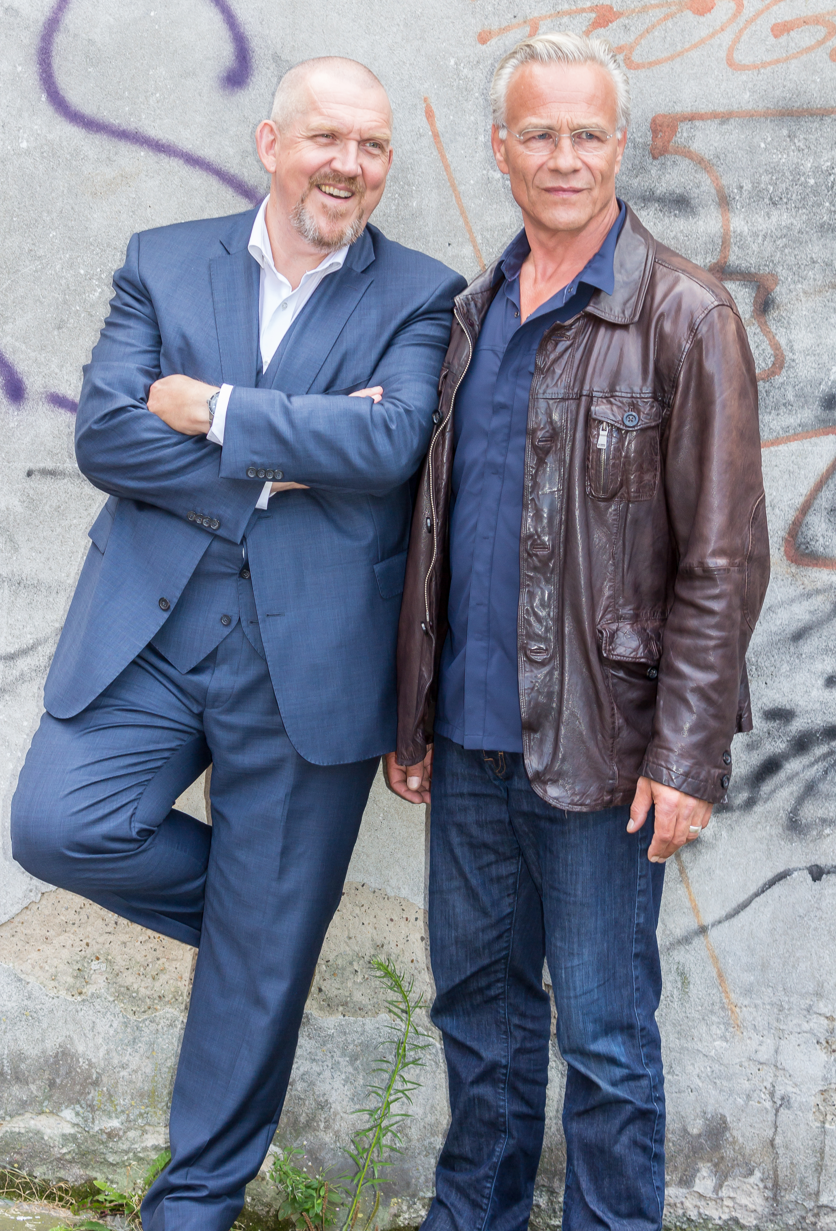 WDR-Dreharbeiten zu Tatort Köln „Wacht am Rhein“ Foto: Dietmar Bär in der Rolle des Kommissars „Freddy Schenk“ und Klaus J. Behrendt in der Rolle des Kommissars „Max Ballauf“